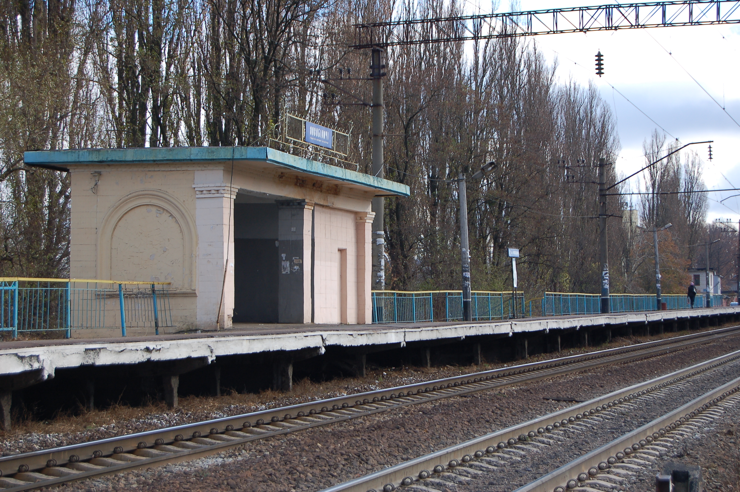 Зупиночний пункт Новобіличі у Києві